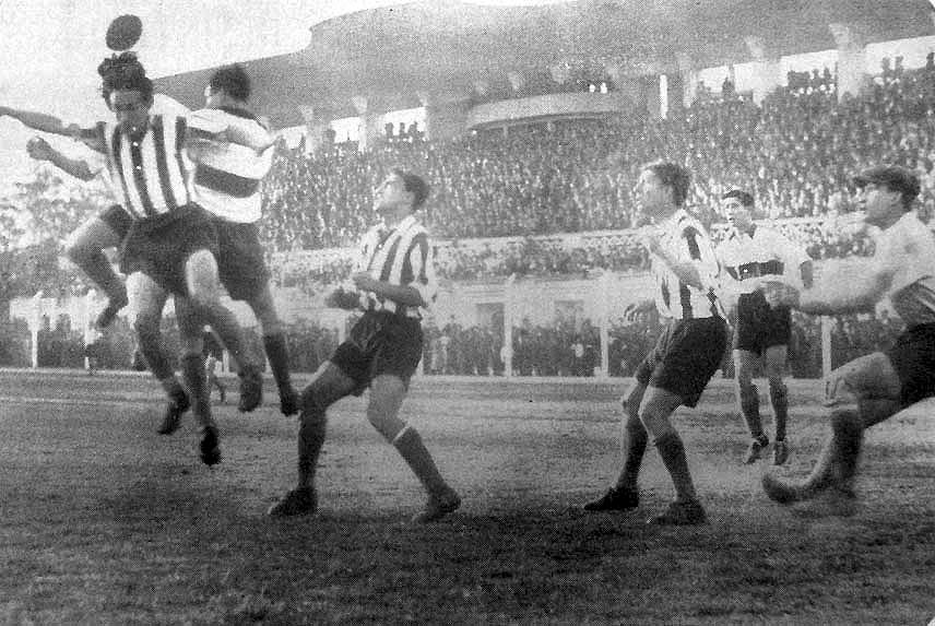 Una escena del clásico platense disputado por la segunda rueda del Campeonato de 1937, que finalizó 1-0 a favor de Gimnasia. En la imagen, la jugada del único gol del partido, convertido por Isidoro Orleans, a los 35 minutos del segundo tiempo